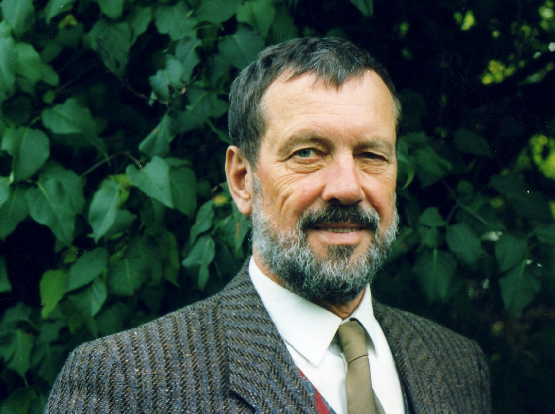 Heinrich J. Pölzl im Stadtpark, Graz